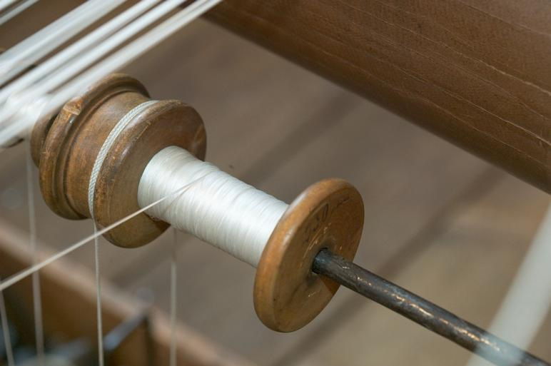 Bobin för stadkanter. Motiv: Almgrens sidenväveri Kategori: Väveri, Museum Bobin för stadkanter.